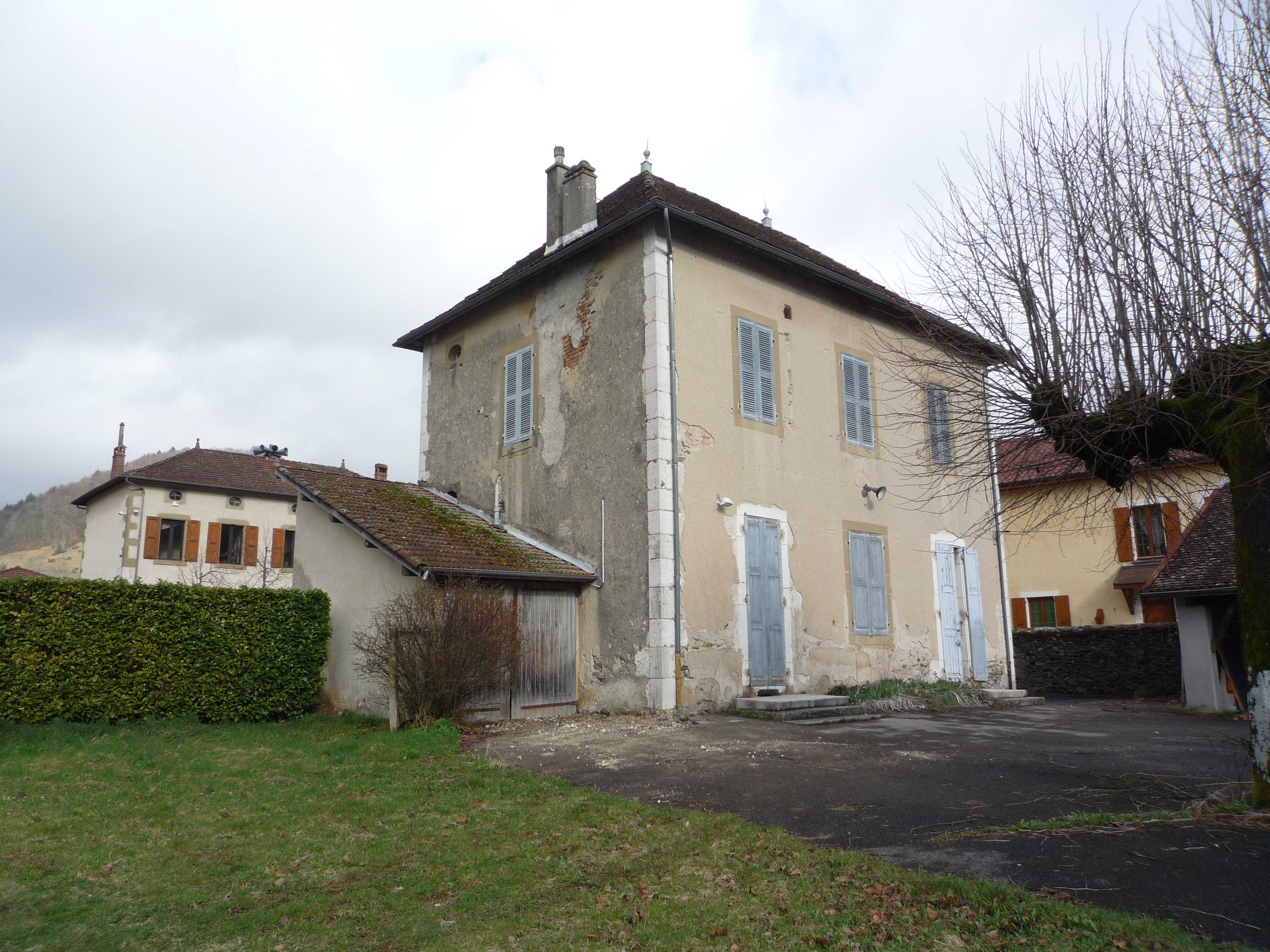 Ancienne Ecole de Saint-Nicolas-de-Macherin, détruite en 2011. Saint-Nicolas-de-Macherin, Isère, France Mars 2011